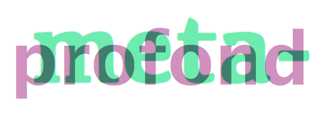 Étymologie des préfixes (meta/profond).